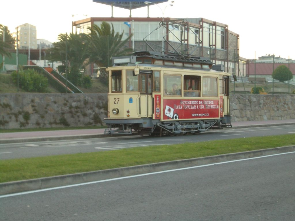 A Coruña, setembre 2007